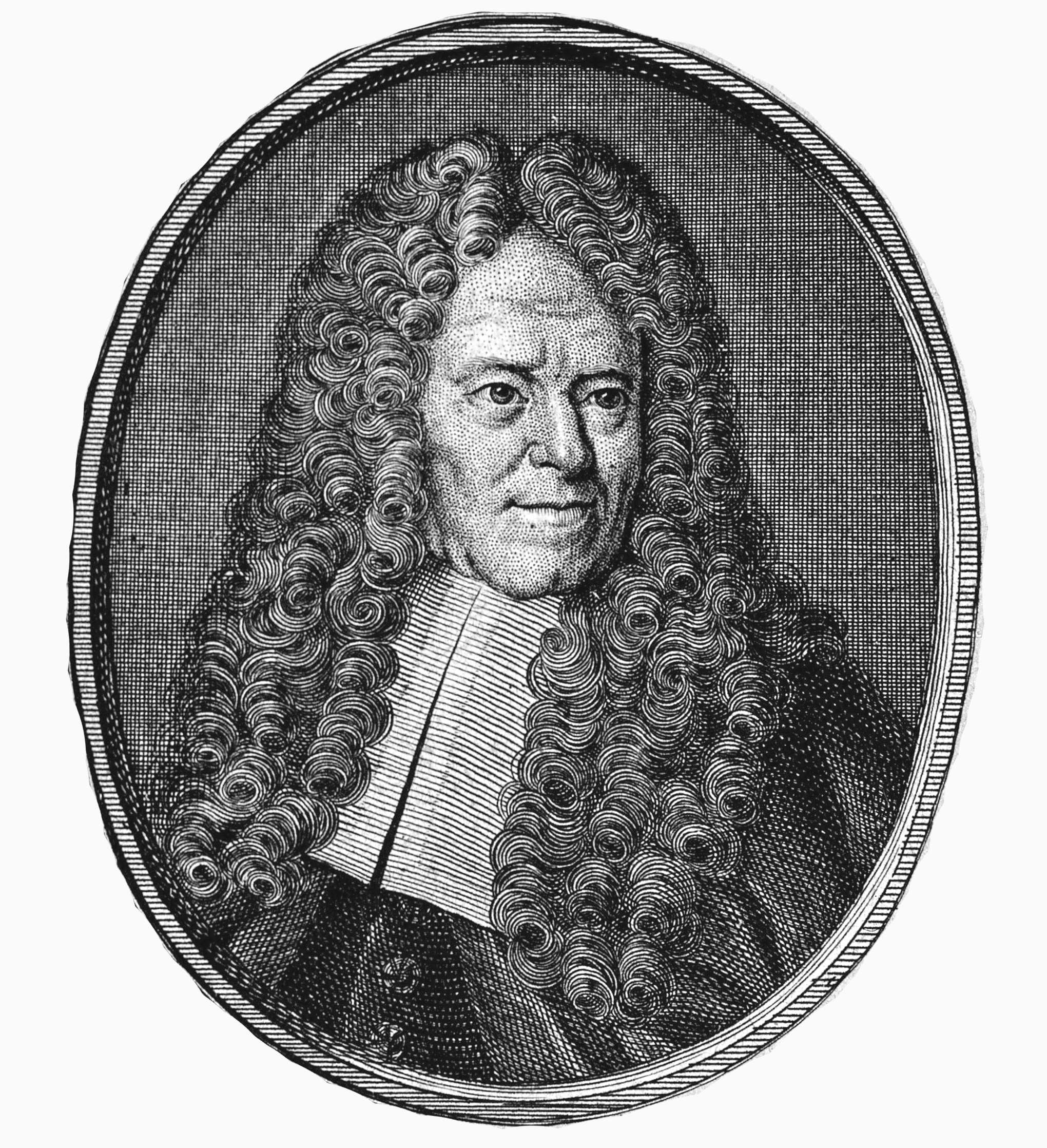 Portrait Ramazzini